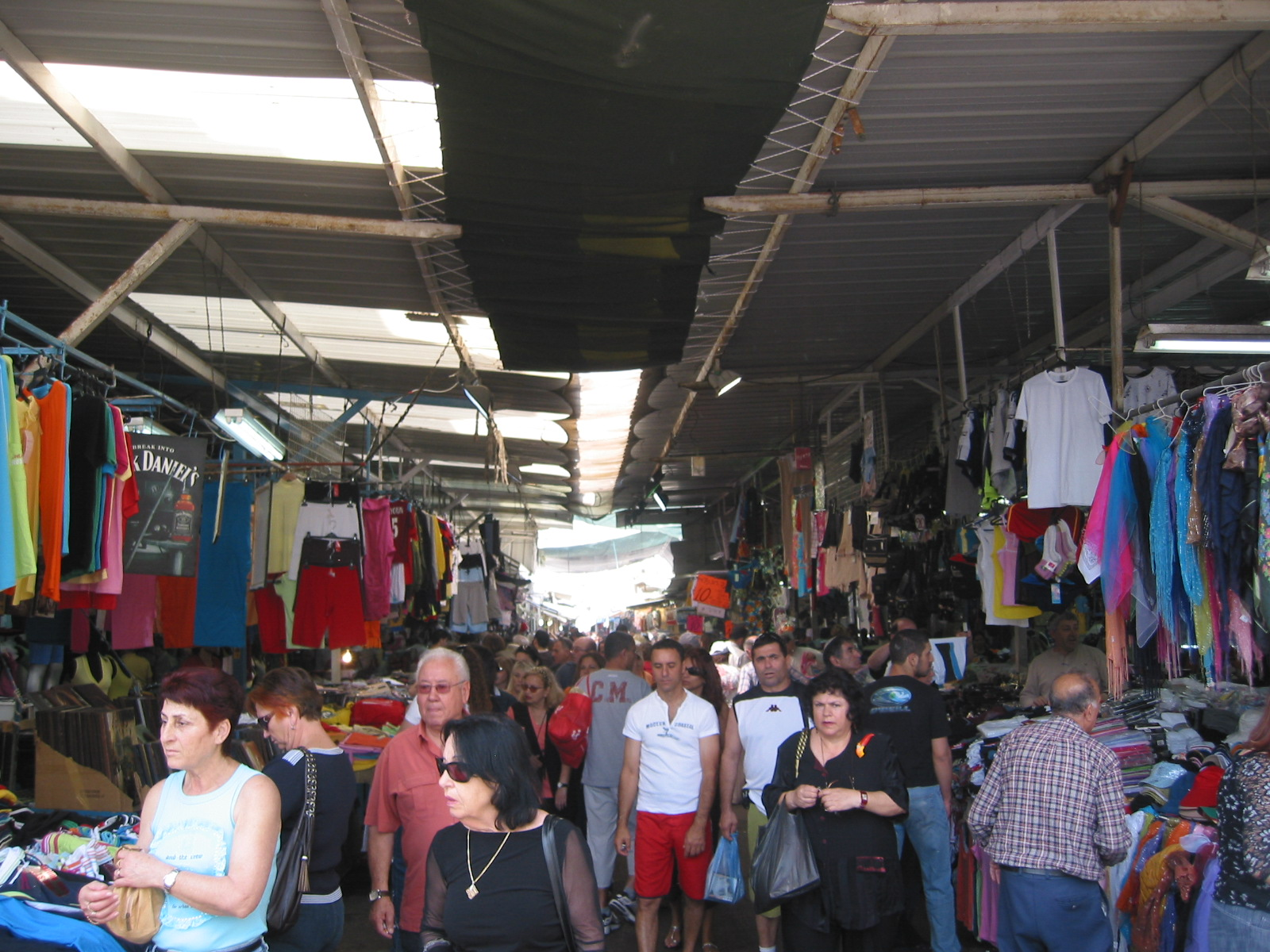 Hacarmel market, Tel Aviv